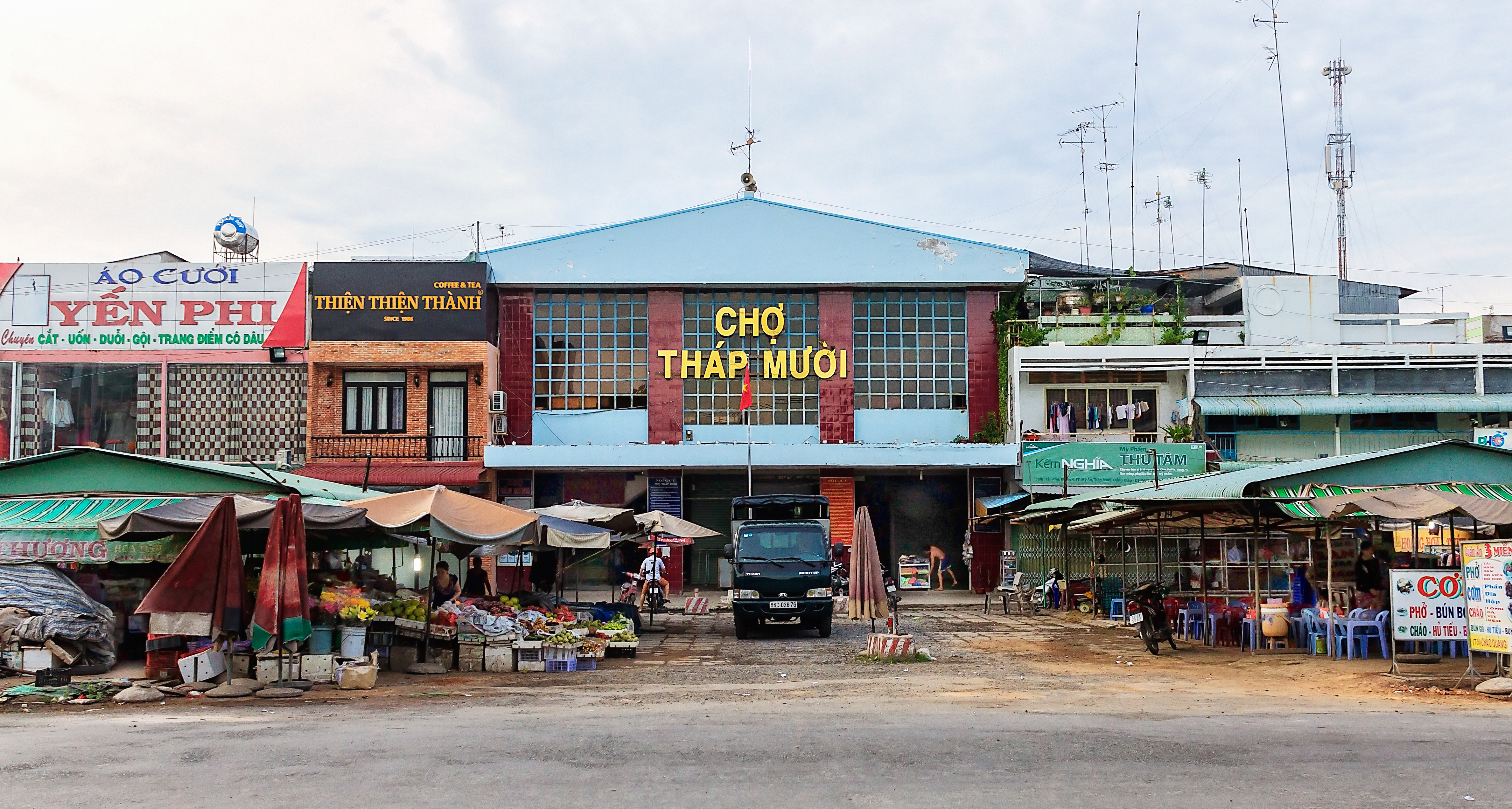 Chợ Tháp Mười ở thị trấn Mỹ An, huyện Tháp Mười, Đồng Tháp, Việt Nam.